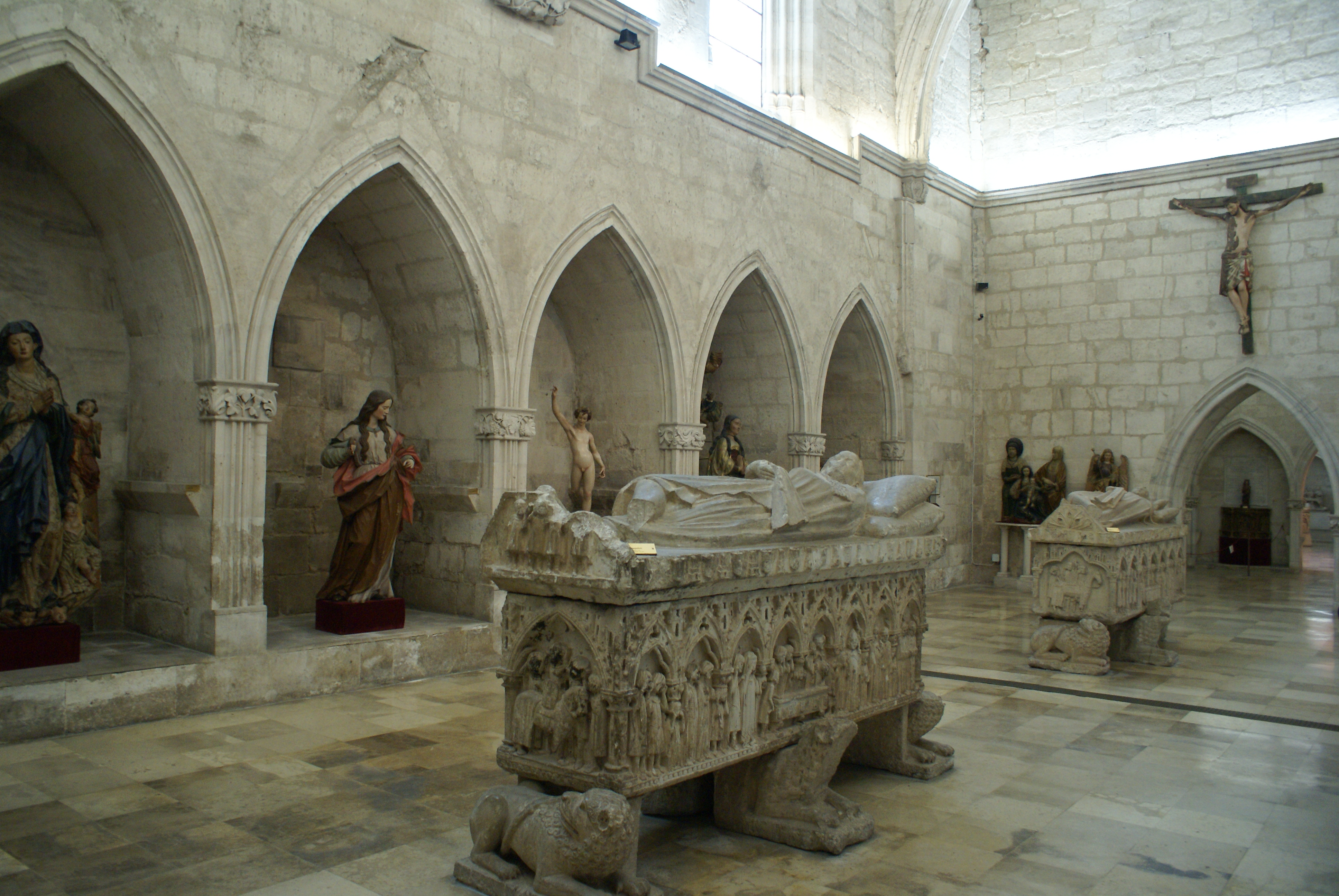 Interior de la Capilla de San Lorenzo, en la Catedral de Valladolid. Espacio reservado al Museo Diocesano y Catedralicio de Valladolid. (Castilla y León, España)